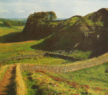 scan van eigen oude foto